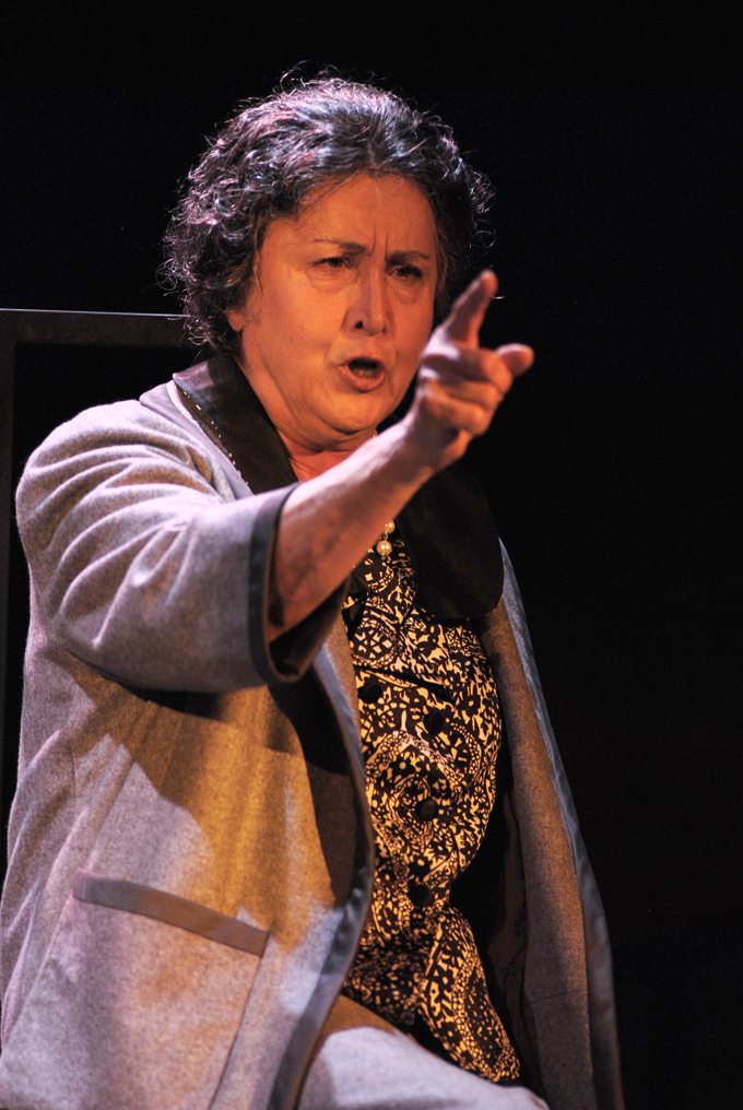 Paola Gassman - Il balcone di Golda